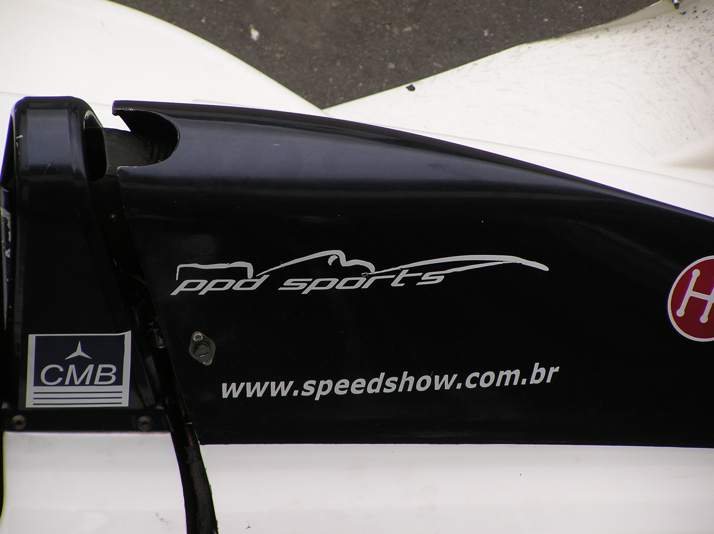 Formula Renault Brasil: PPD Sports. PPD = Pedro Paulo Diniz, a former-Formula 1 driver.